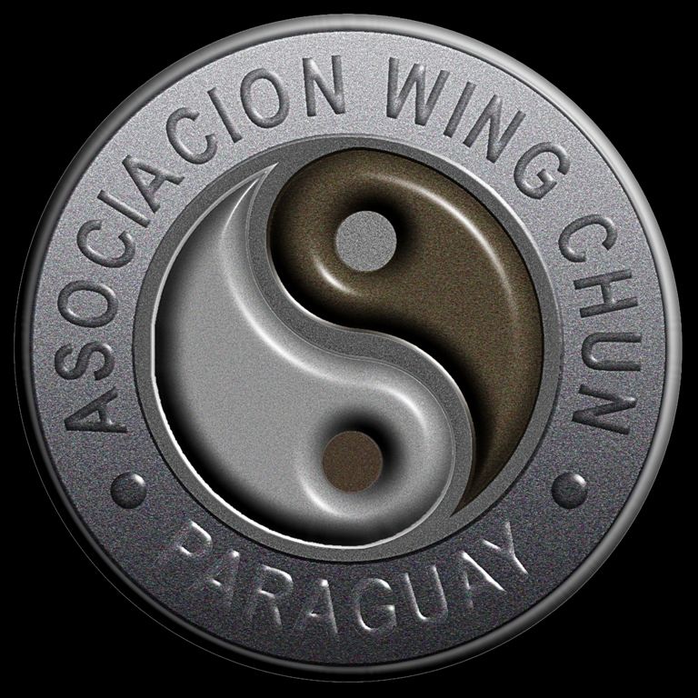 La Asociacion Wing Chun Paraguay nuclea a todas los profesionales y practicantes del Sistema en Paraguay.